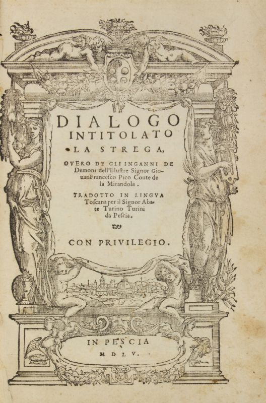 DIALOGO INTITOLATO LA STREGA, OVERO DE GLI INGANNI DE DEMONI [...] TRADOTTO IN LINGUA TOSCANA PER IL SIGNOR ABATE TURINO TURINI DA PESCIA.